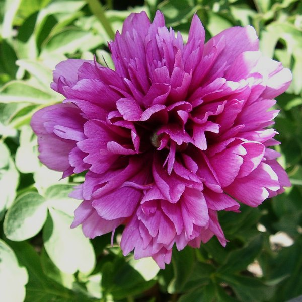 Paeonia anomala subsp. veitchii